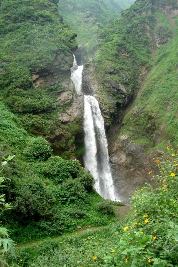 Hermosas Cataratas, principal atractivo turístico de Matucana